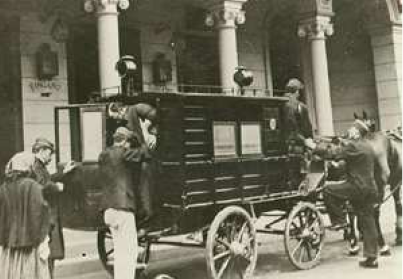 Rettungskutsche um 1880